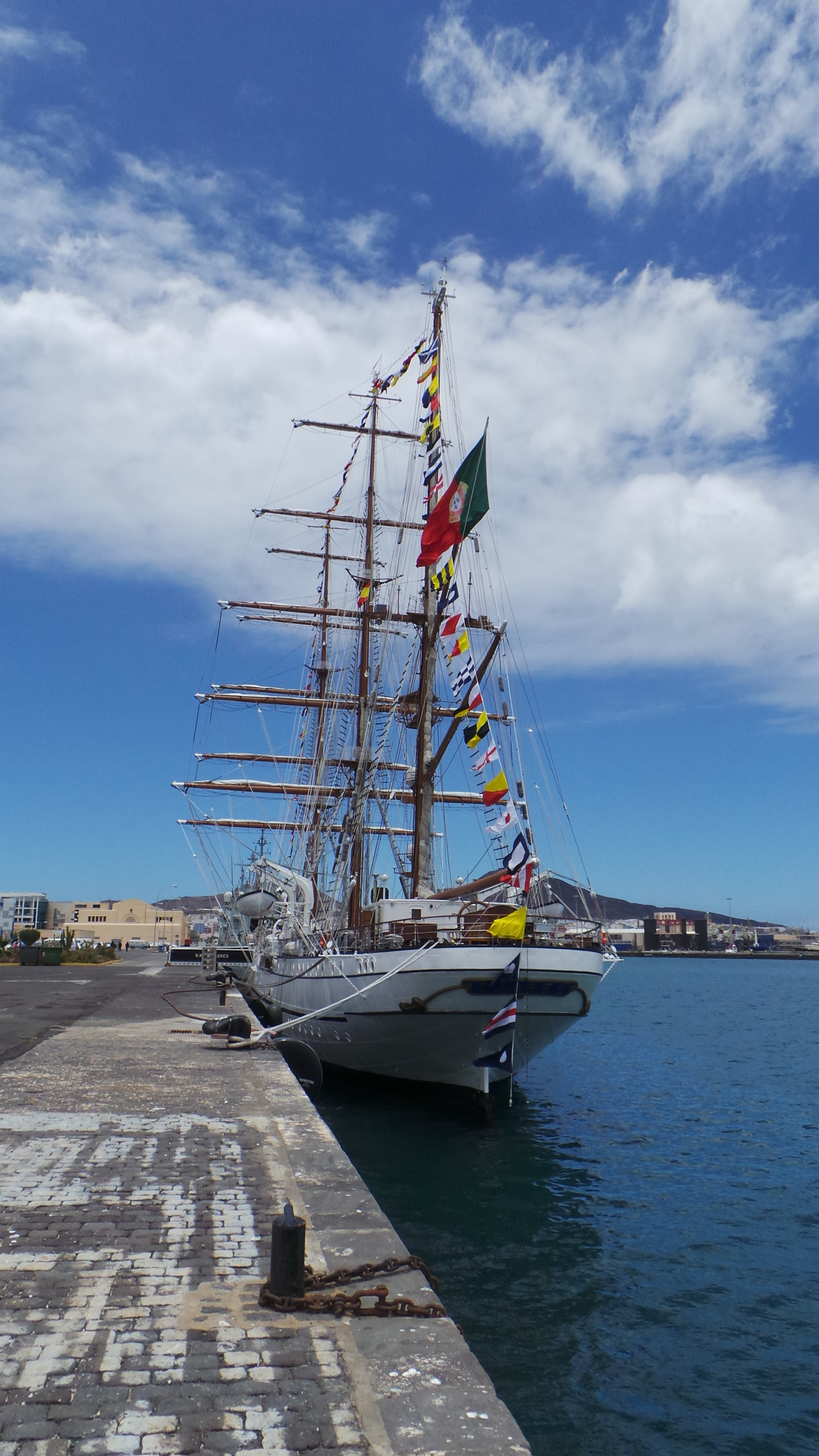 Visita al Buque Escuela NRP Sagres, en La Base Naval de Las Palmas de Gran Canaria. Este fin de semana de semana ( 20, 21 y 22 de junio de 2014) tenemos la oportunidad de disfrutar, en Las Palmas de Gran Canaria, de la visita del buque escuela portugués NRP Sagres, se encuentra atracado en el muelle de la base naval y podrá ser visitado hoy viernes hasta las 19h y mañana sábado de 10 a 12h y de 14 a 19h . El Buque proveniente de Lisboa partirá el domingo hasta Las Azores , para luego regresar a Lisboa, cuenta con unos 60 guardiamarines, con una decena de mujeres entre ellos, que realizan su periodo de instruccion Construido en 1937 en Hamburgo y tras varios avatares, fue adquirido en 1961 por la marina Portuguesa para sustituir al Sagres II, entrando en servicio como Sagres III en febrero de 1962. Tiene 89,5 metros de eslora, 12 de manga y 5,5 de calado, siendo su altura máxima de 45,5 metros. Cuenta además con 1.971 metros cuadrados de vela y desplaza 1.893 toneladas. La figura del mascarón de proa del Sagres III es el Infante D. Henrique nacido el 4 de marzo de 1394, siendo uno de los impulsores de la expansión y descubrimientos portugueses de la época. Más información del Buque : Web del Buque